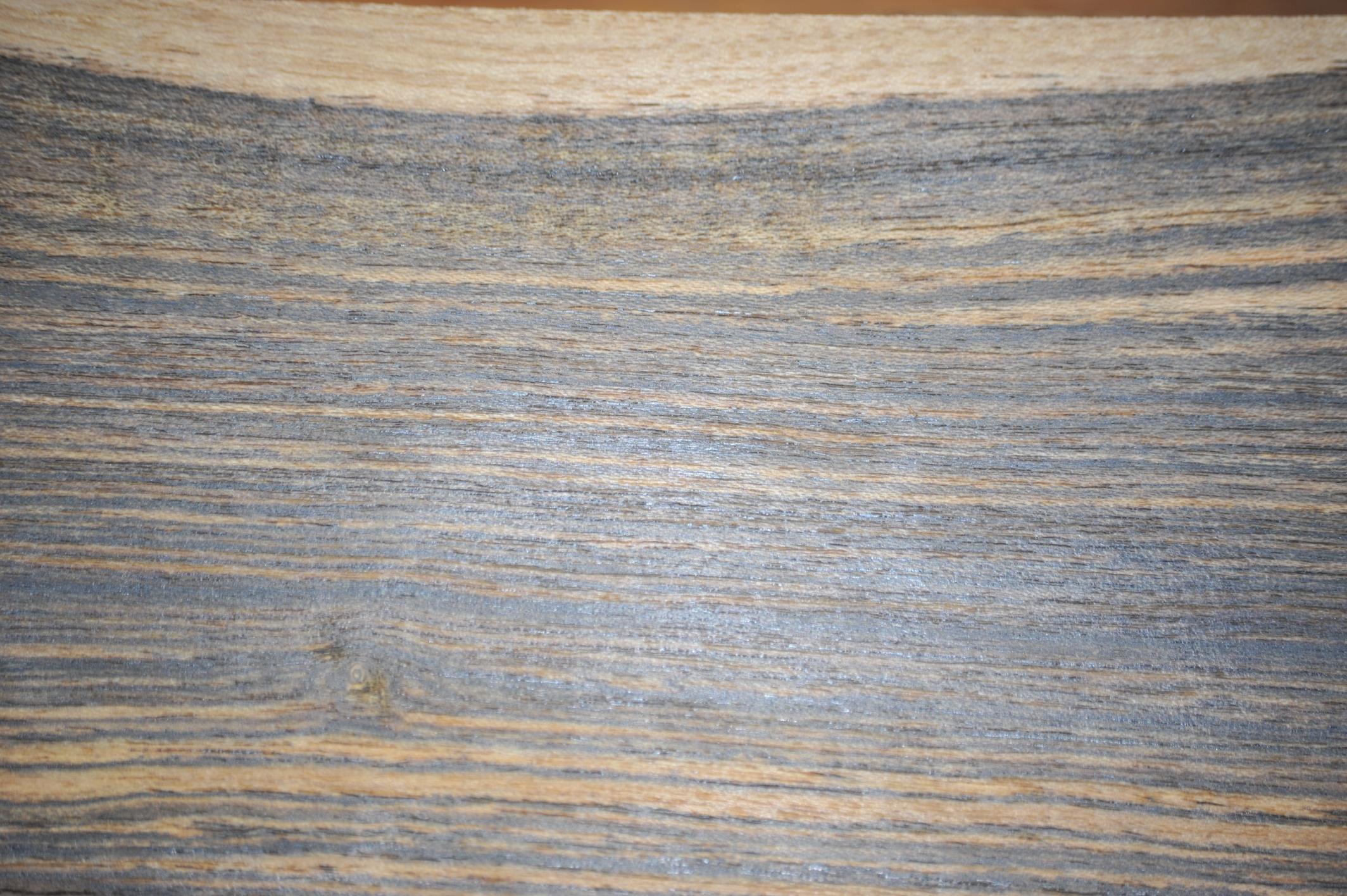 Makroaufnahme eines frisch gehobelten Brettchens von ca. 10x14 cm